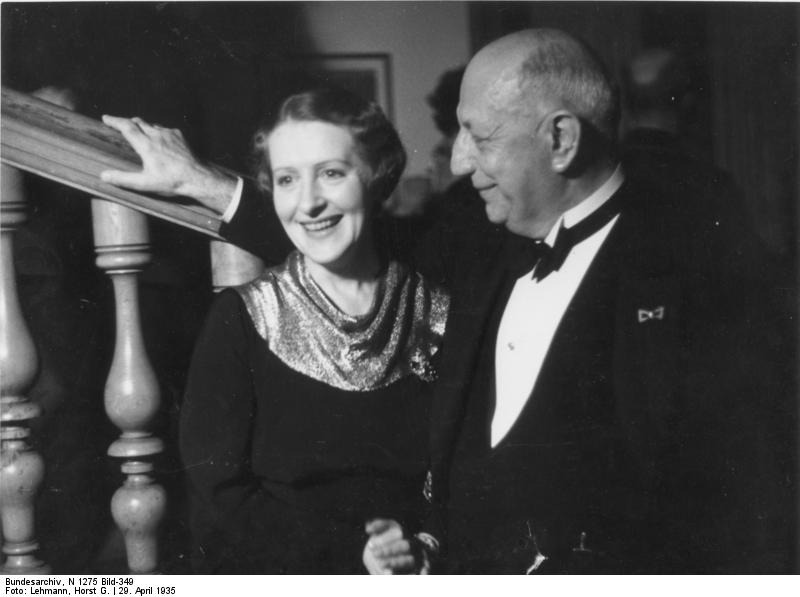 Henny Porten und Oskar Messter auf dem Internationalen Film-Kongress 1935, anlässlich der von der Reichsfilmkammer veranstalteten Vorführung der ersten Filme des Reichsfilmarchivs im Harnack-Haus. (Aufnahme Horst G. Lehmann.)